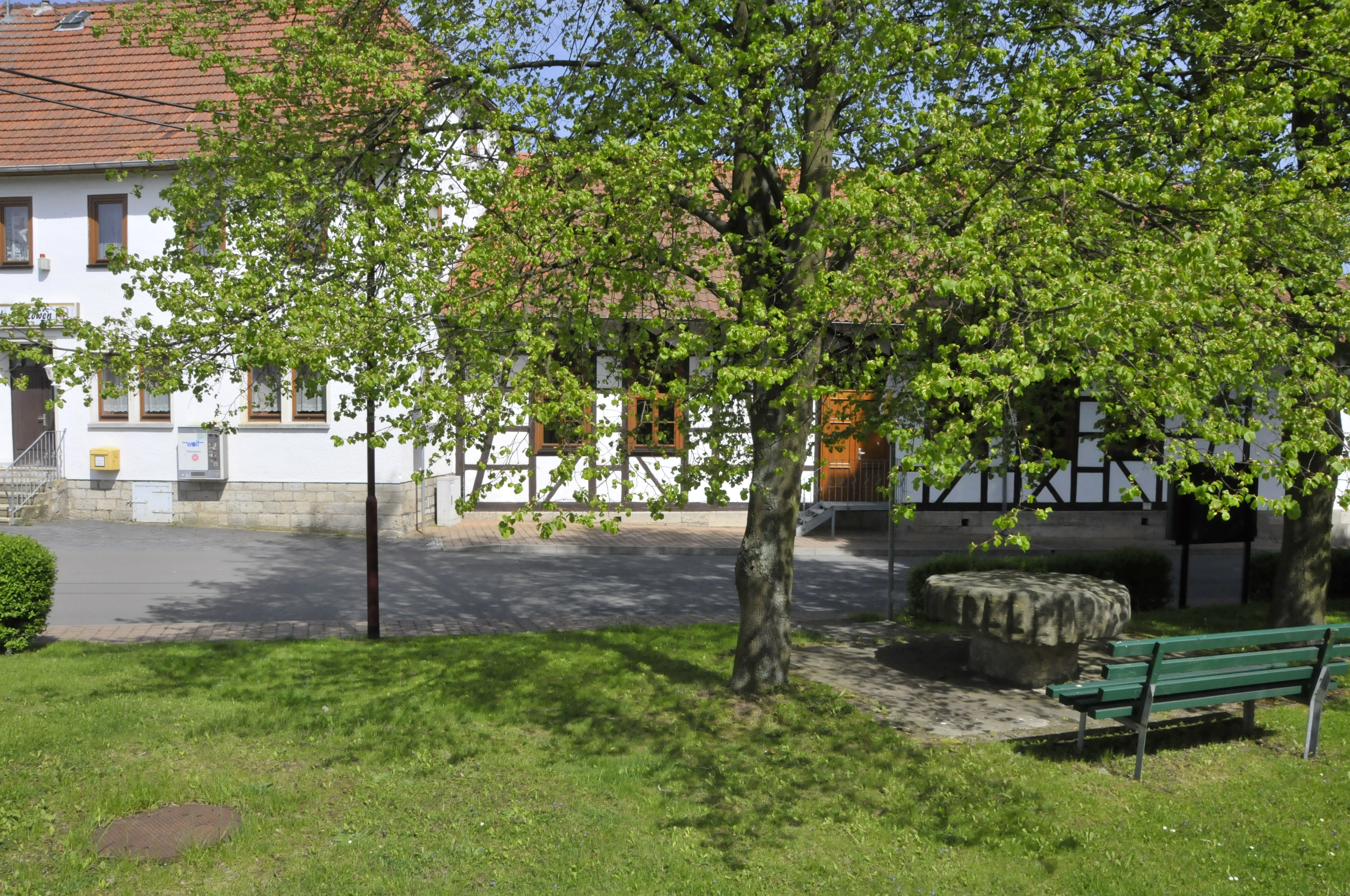 Großurleben, Anger